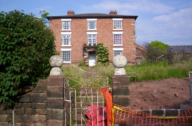 Hapsford Hall